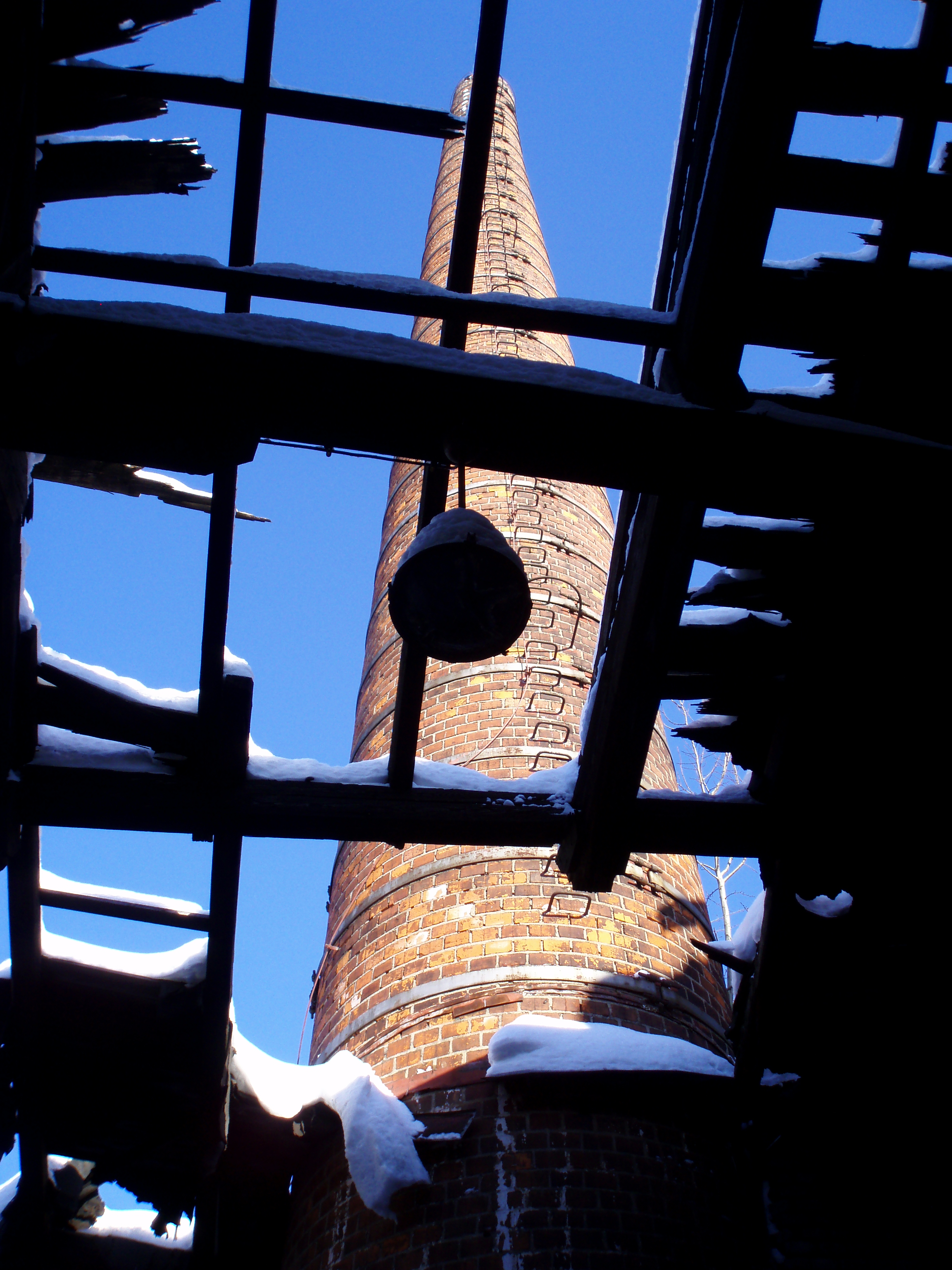 Kuklenská koželužna